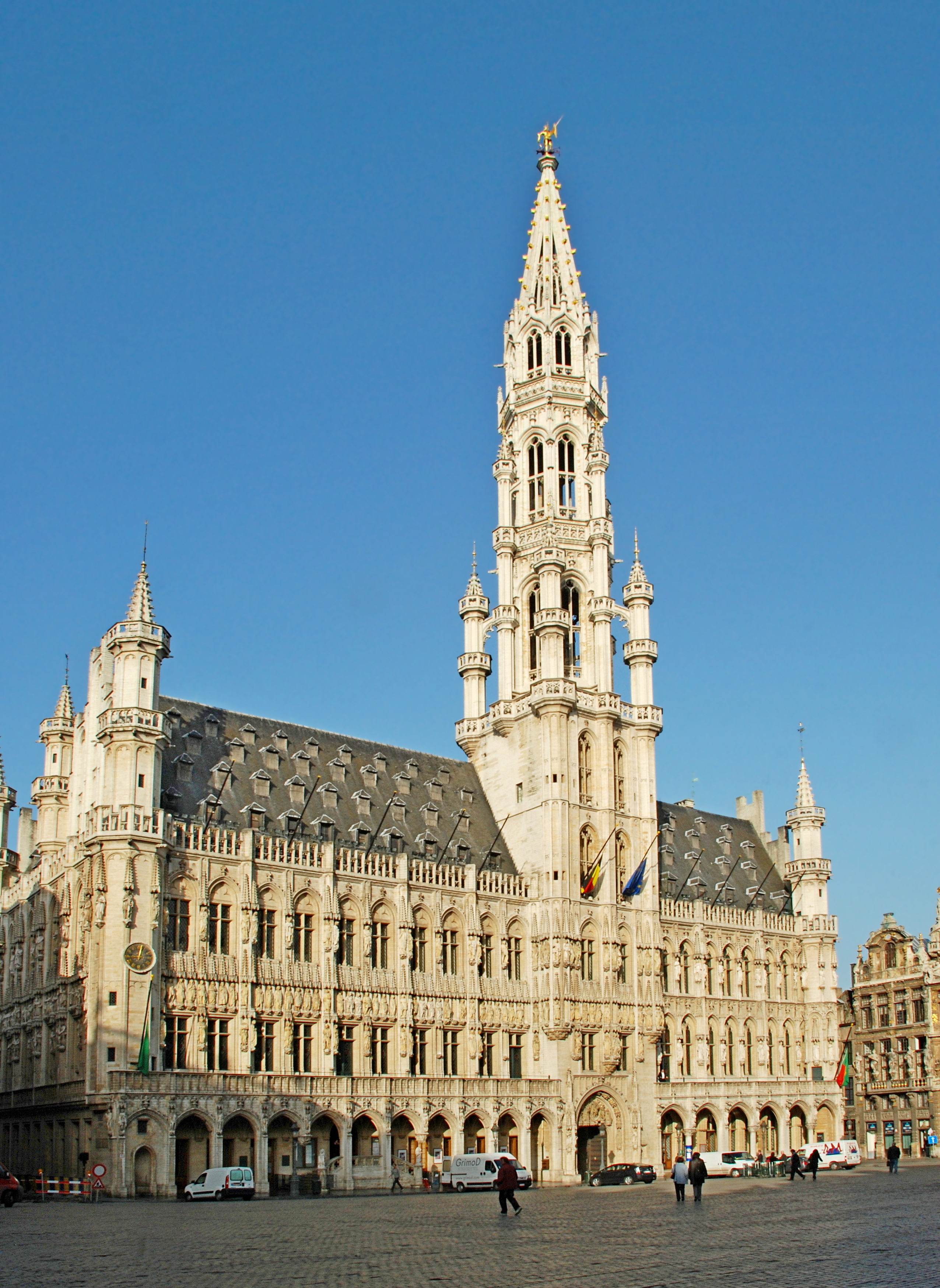 Belgique - Bruxelles - Hôtel de Ville - façade principale